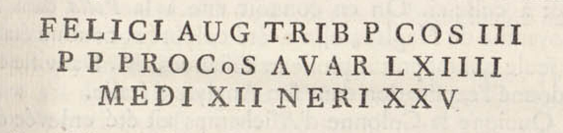 Lecture de Anne Claude de Caylus, comte de Caylus, du milliaire CIL 17-02, 489, en 1759. Quelques erreurs on depuis été rectifiées : lire MED L XII NER L XXV à la dernière ligne.